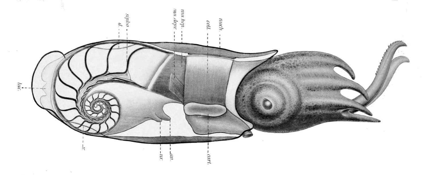 Spirula spirula